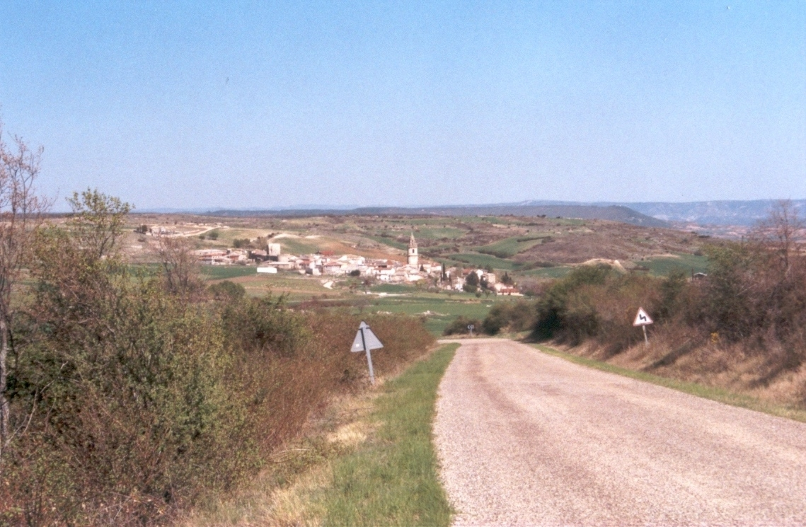 Vista de la comarca de la Alcarria hacia la villa de Escamilla. La extensa meseta de la Alcarria aparece bruscamente cortada por la erosión remontante de los ríos que van hacia el sur y sureste (lado derecho de la imagen). Autor: Fev. Fecha: mayo 2005.